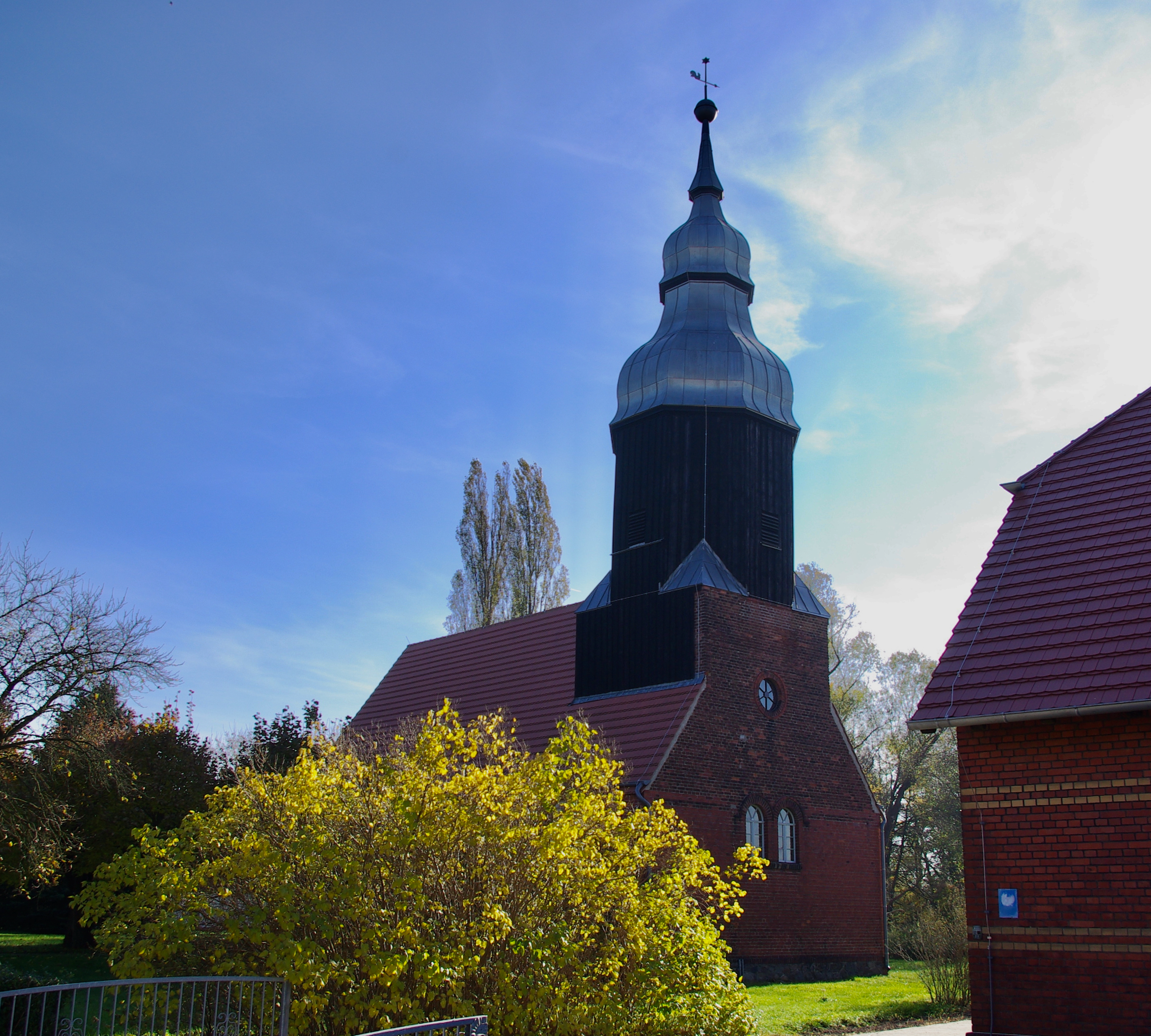 Kasel-Goluig in Brandenburg. Die Kirche im Ortsteil Jetsch steht unter Denkmalschutz.